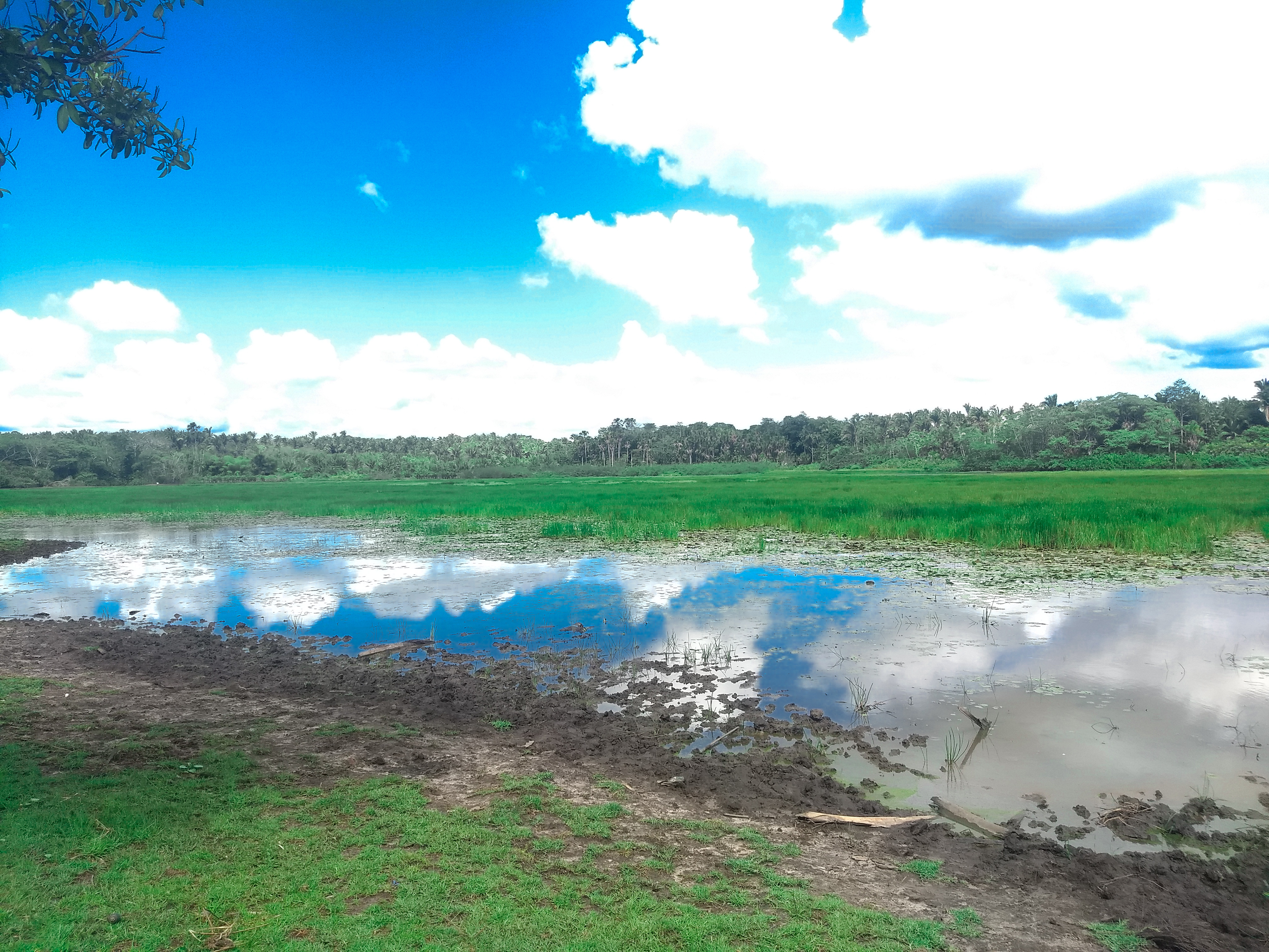 campo de pesca de madragoa